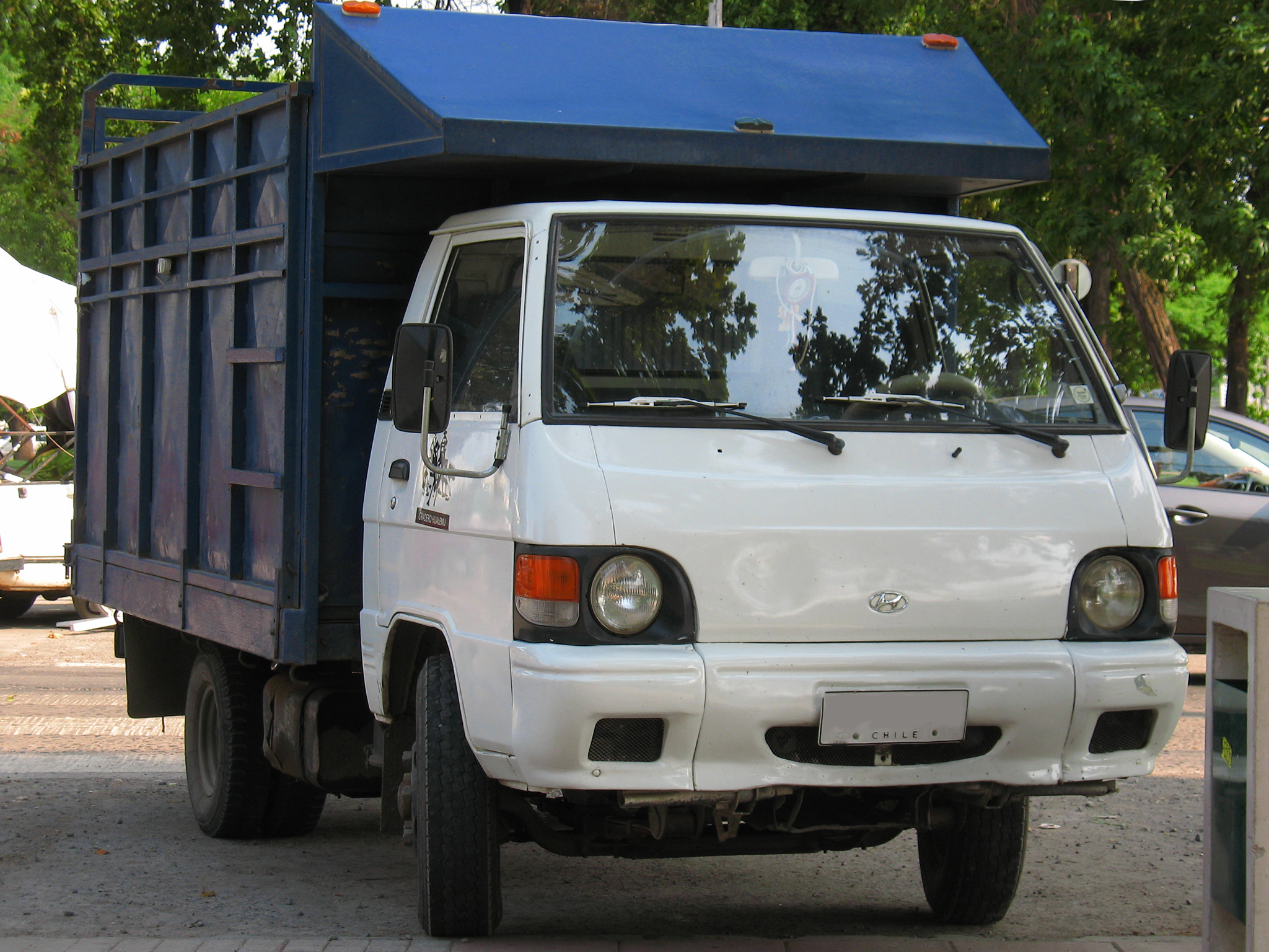 Hyundai H100 Porter Super 1997